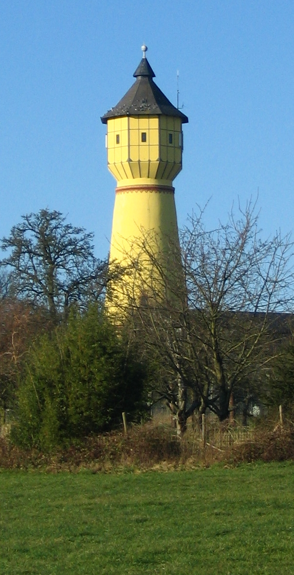 historischer Wasserturm Kirchberg im Hunsrück